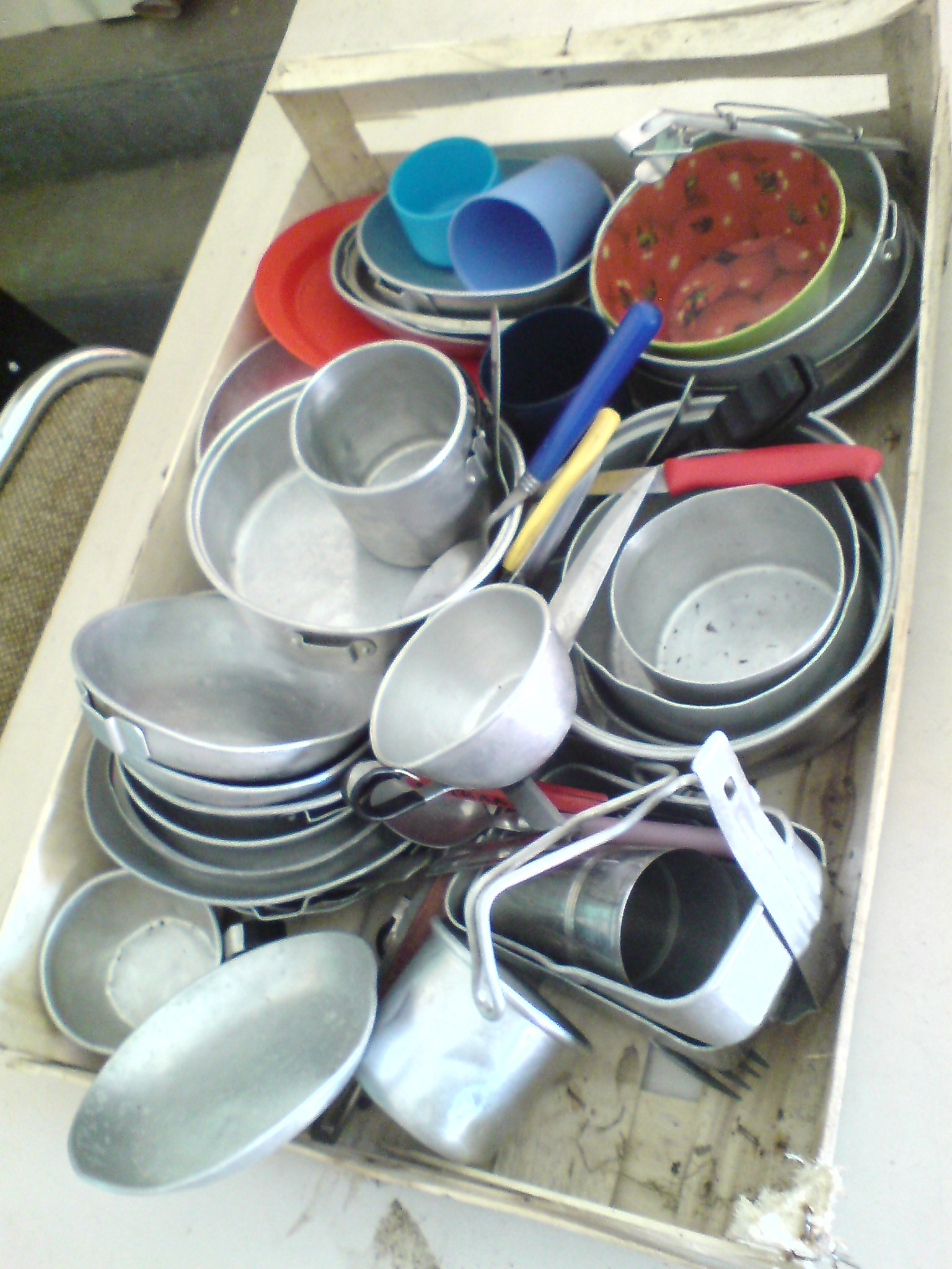 Gamelles en alu des scouts à Belfort